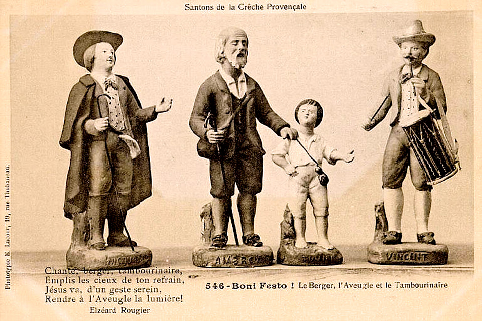 Carte postale du début du XXe siècle avec trois santons de la crèche provençale